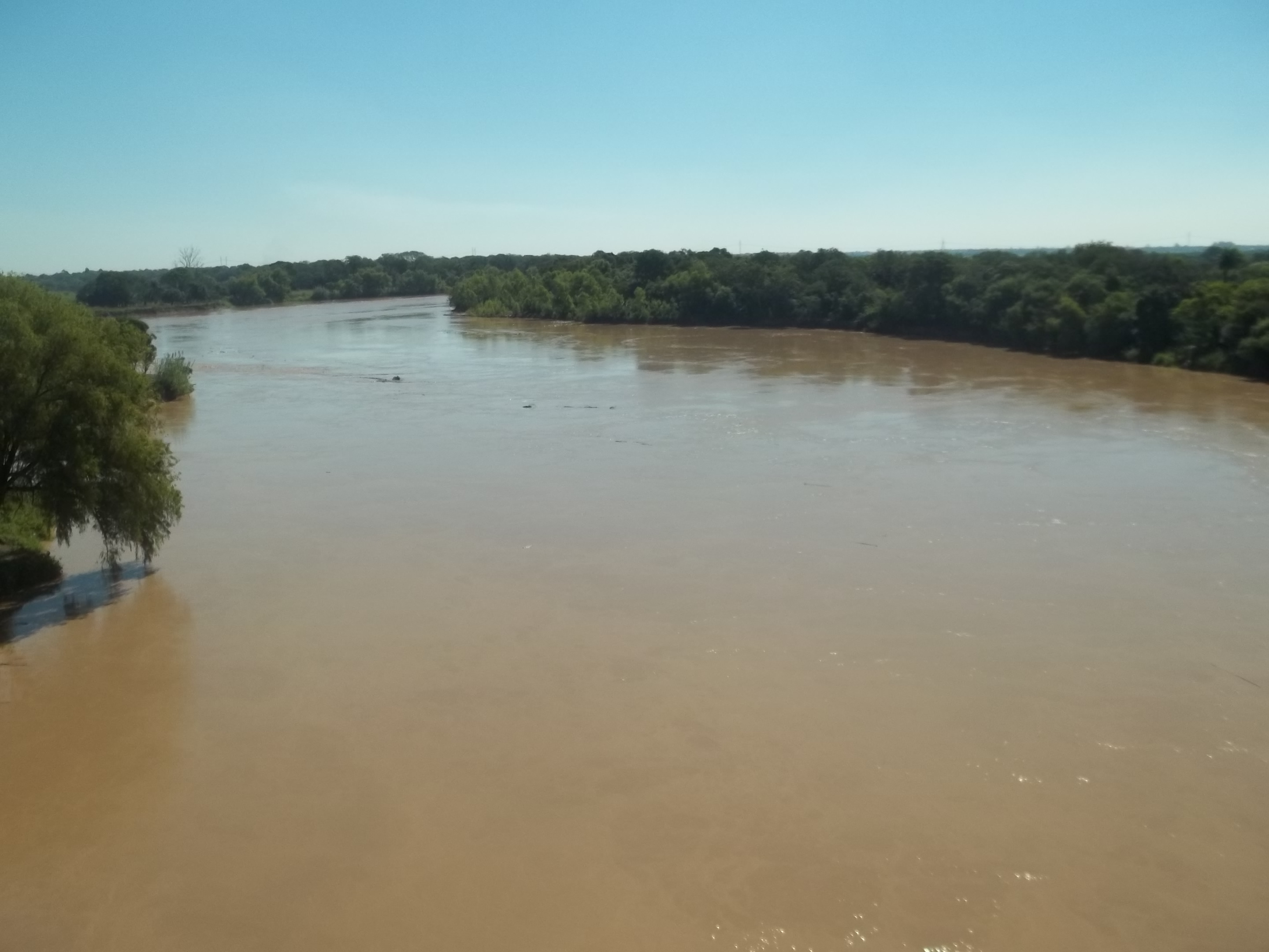 Vista del río Bermejo hacia el norte del puente General Mansilla-Puerto Eva Perón.